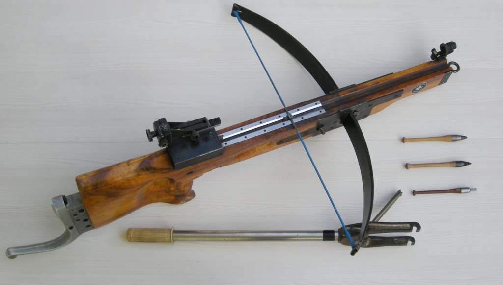 Armbrust CH Winzeler